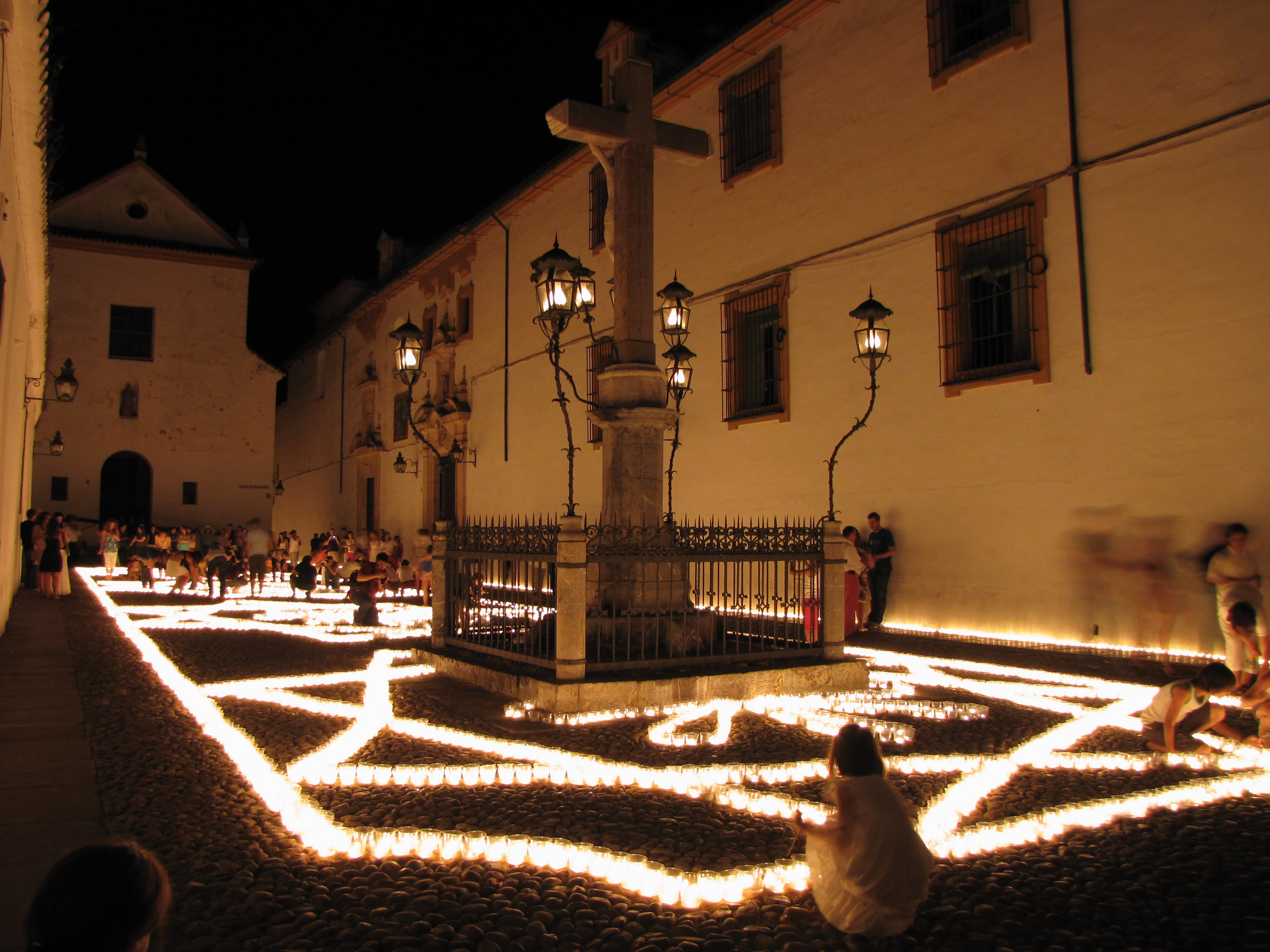 Cristo de los Faroles iluminado con velas (Córdoba, España).